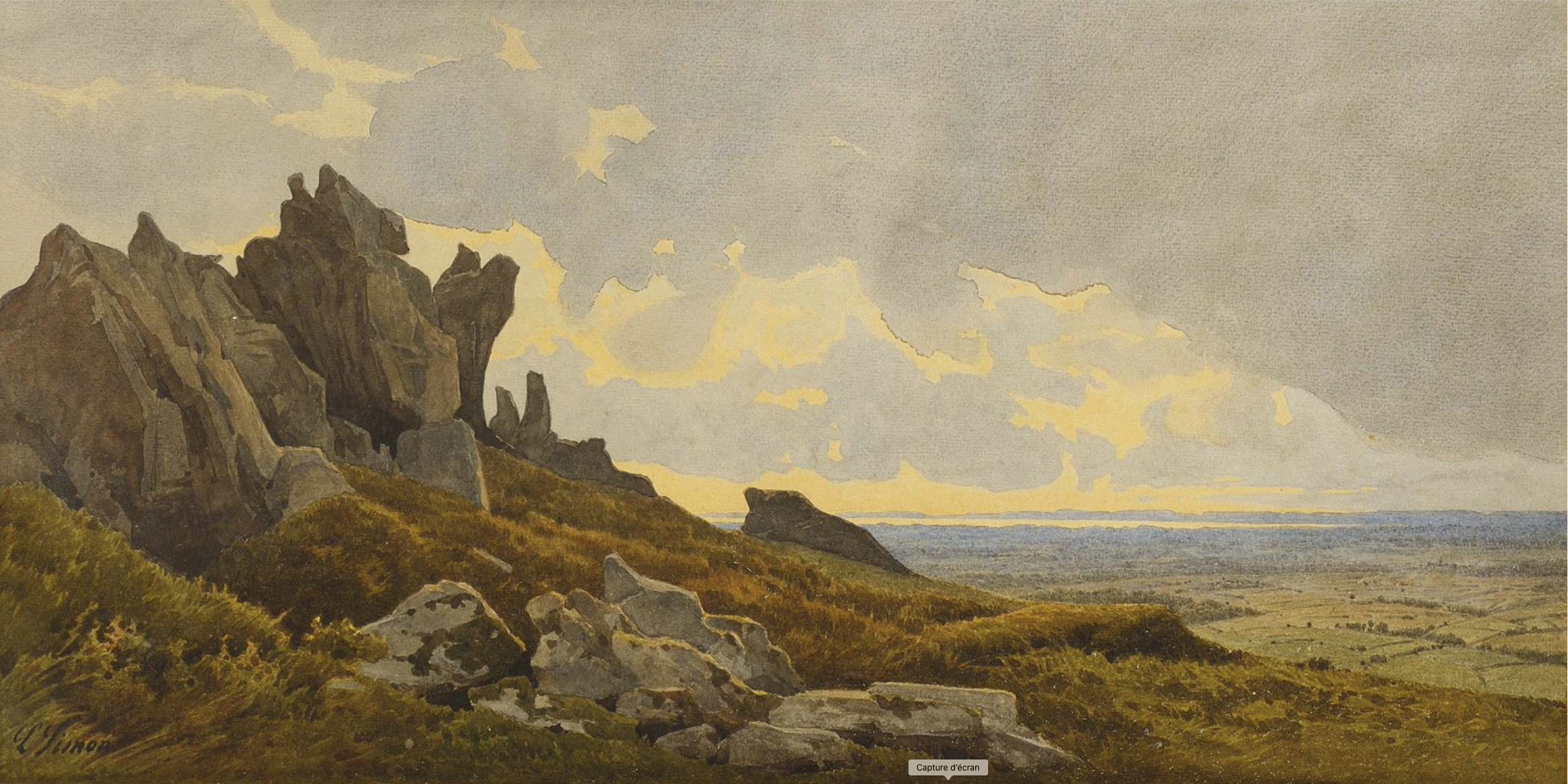 Vue de la rade de Brest et du marais St Michel depuis le Roc'h Trevezel - 1875 - par Léon SIMON